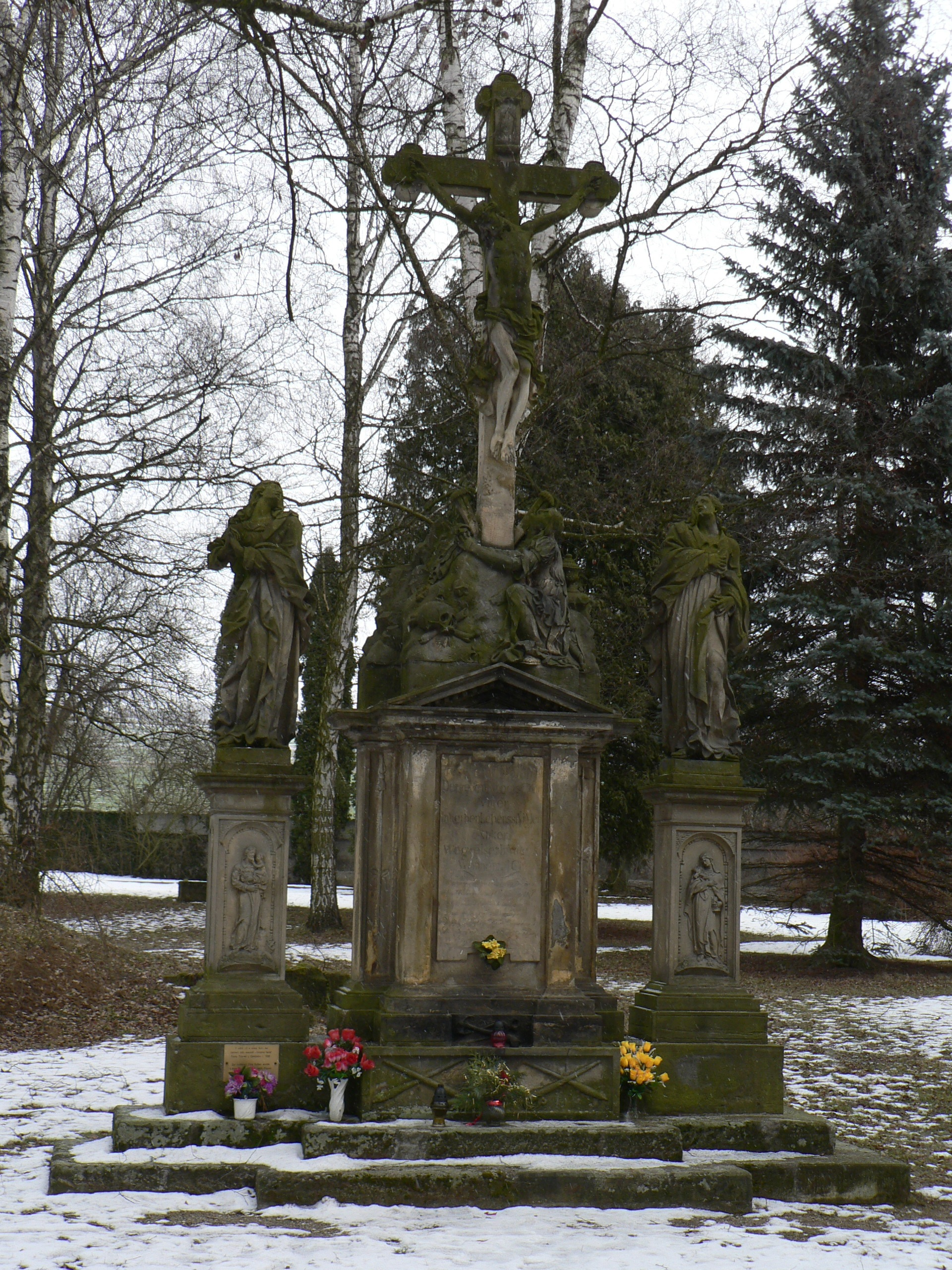 Libina, Kalvárie na hřbitově, klasicistní z přelomu 18. a 19. století